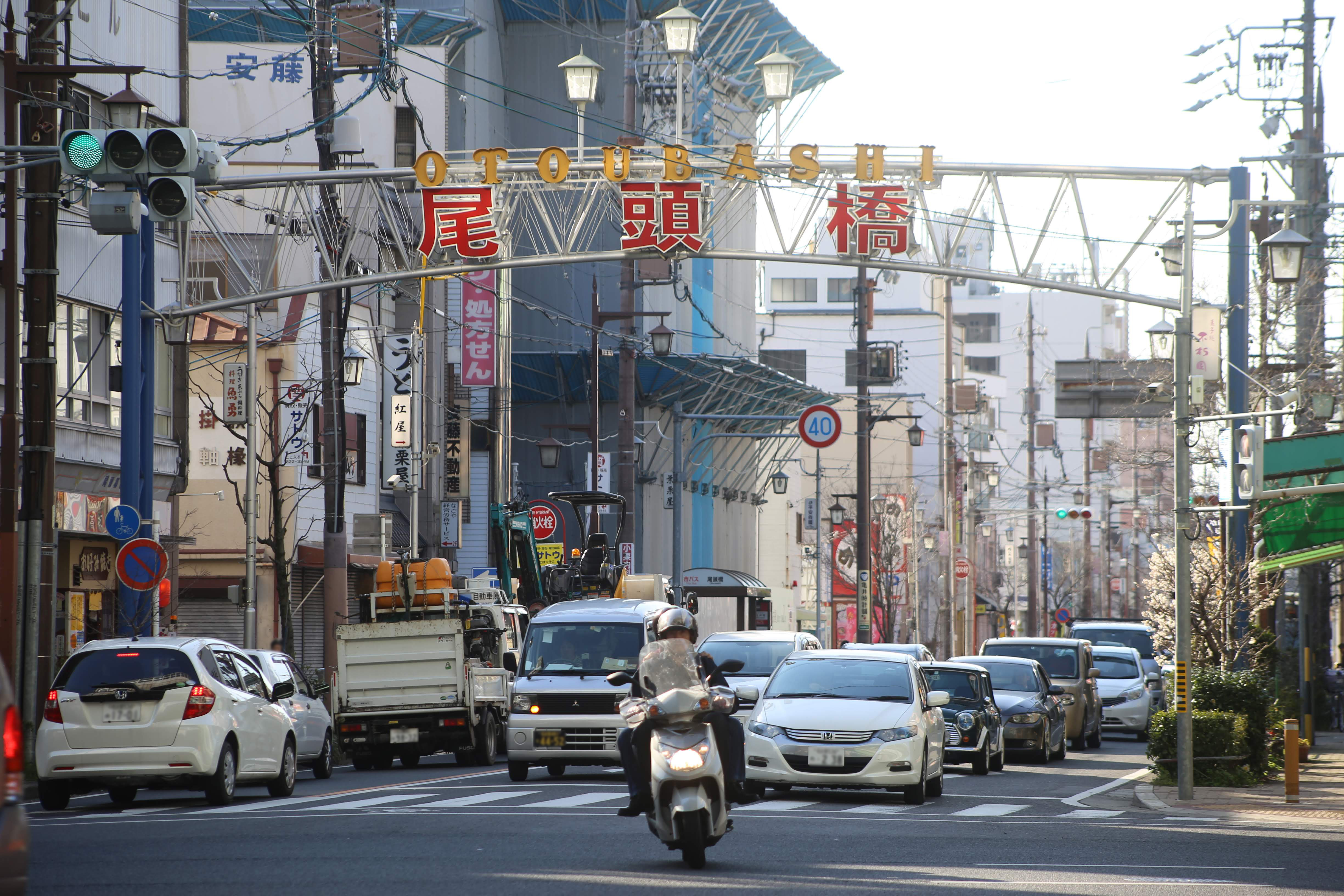 尾頭橋商店街入口